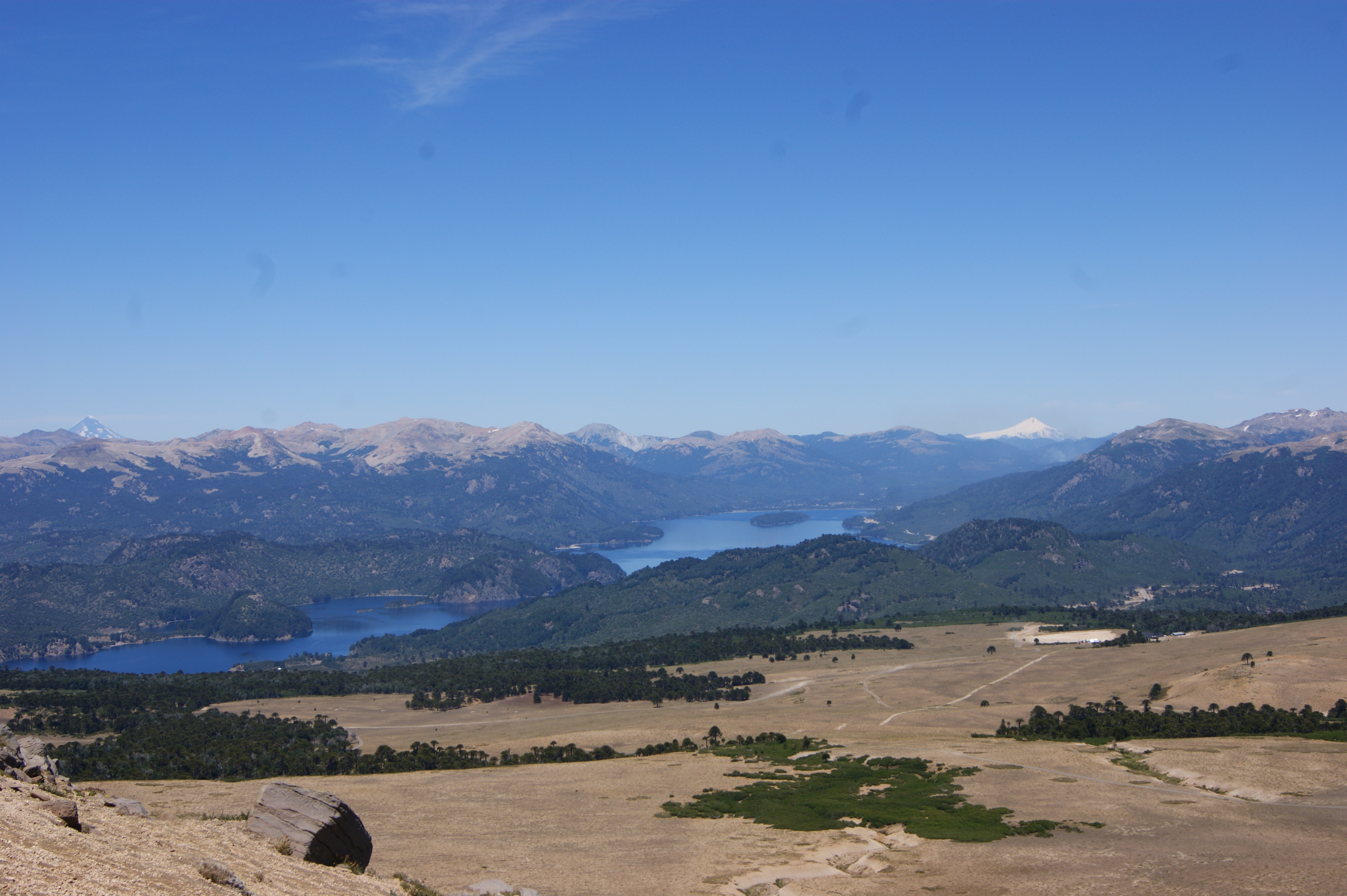 Vista Panorámica Lago Alumine, Neuquen.